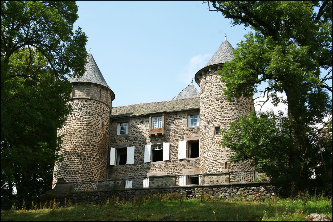 Le château de Chavagnac dans le Cantal (France) .